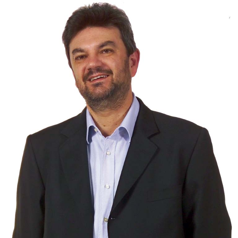 Damiano Zoffoli